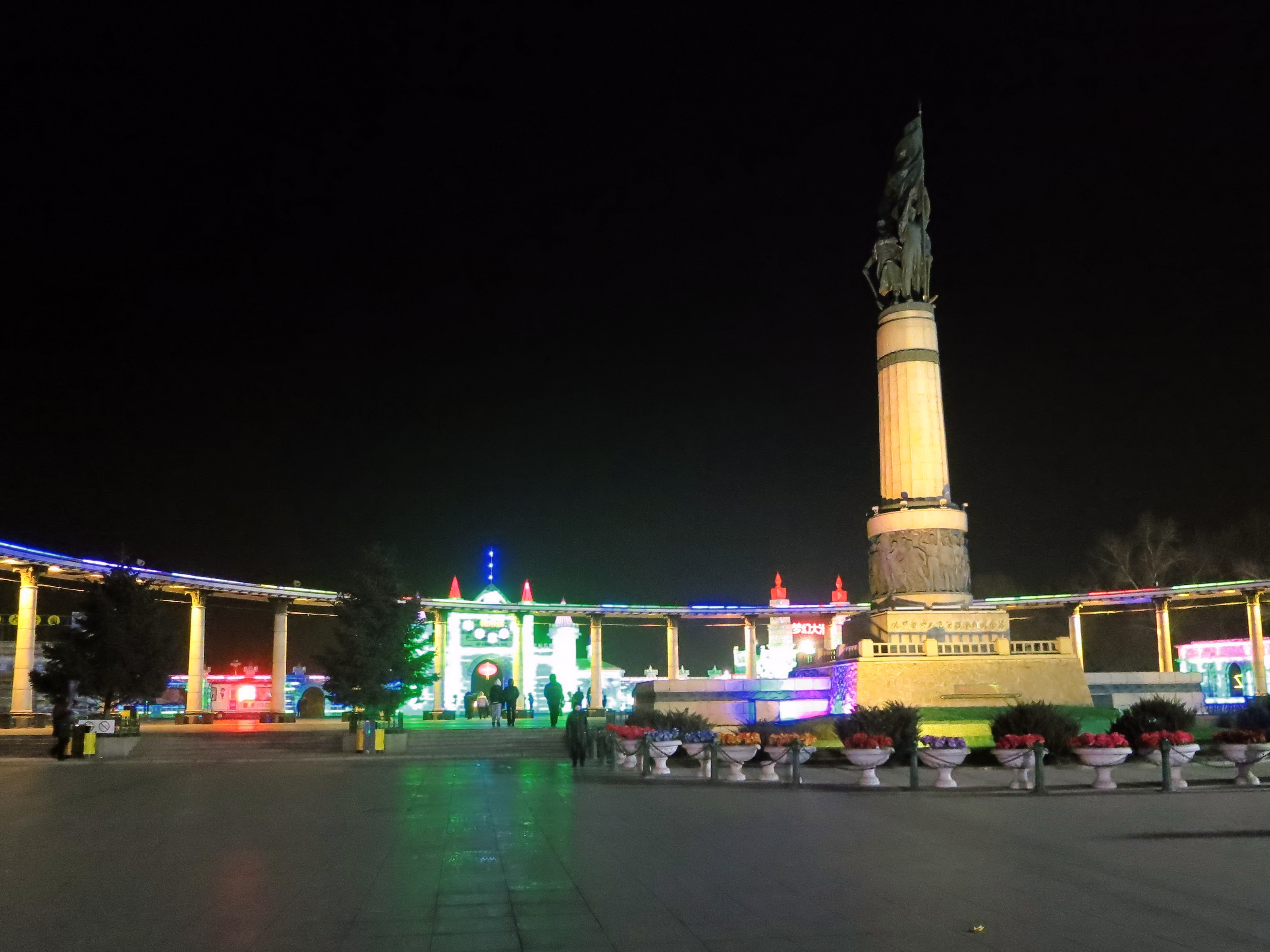 中文（香港）: 防洪纪念塔